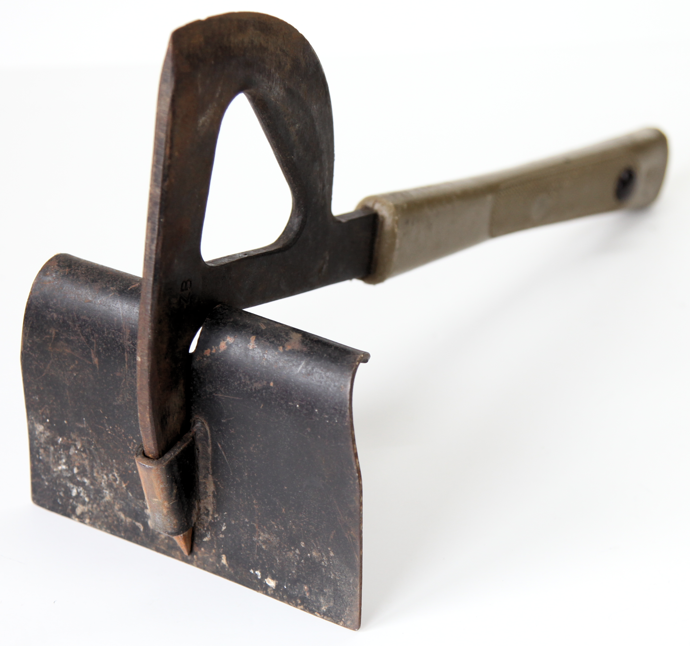 Bergungsbeil THW